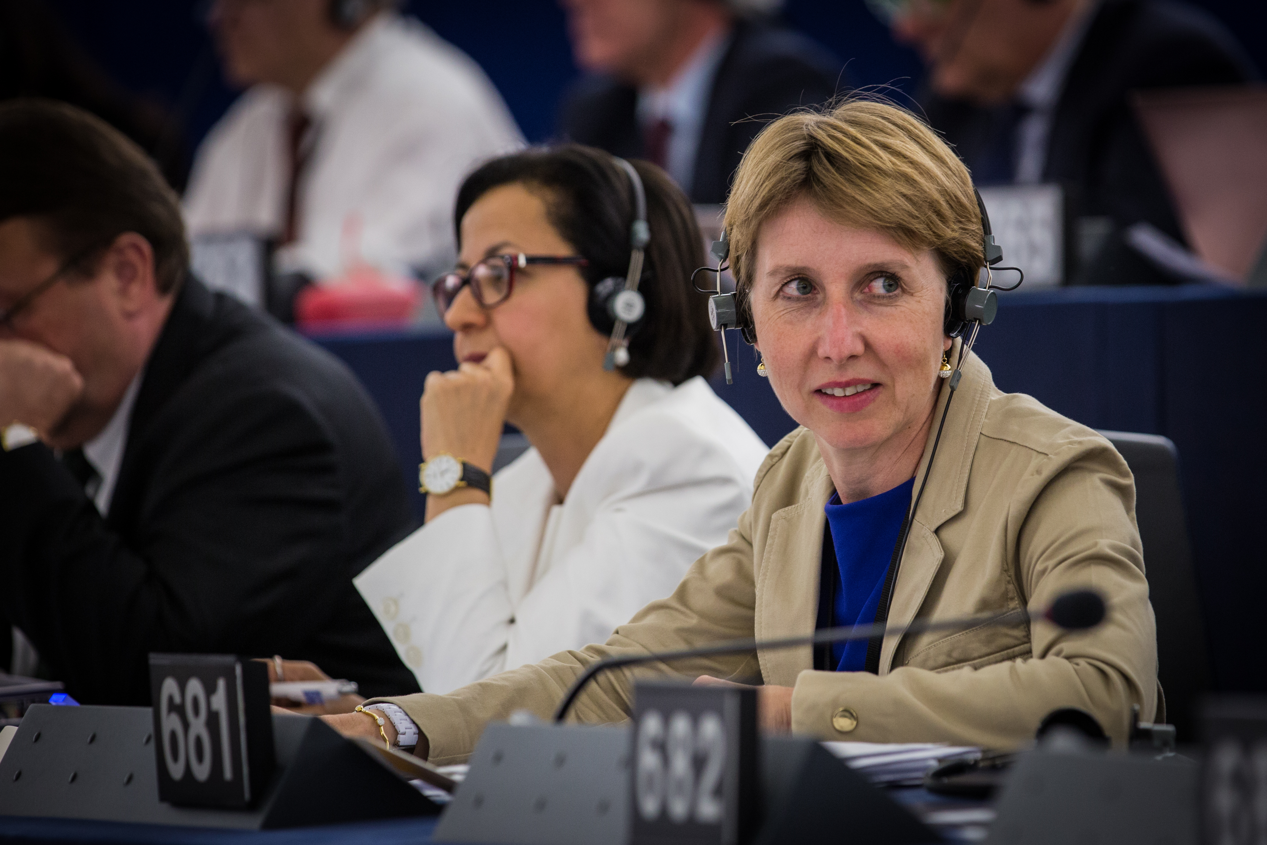 Anne Sander Parlement européen Strasbourg 1er juillet 2014.